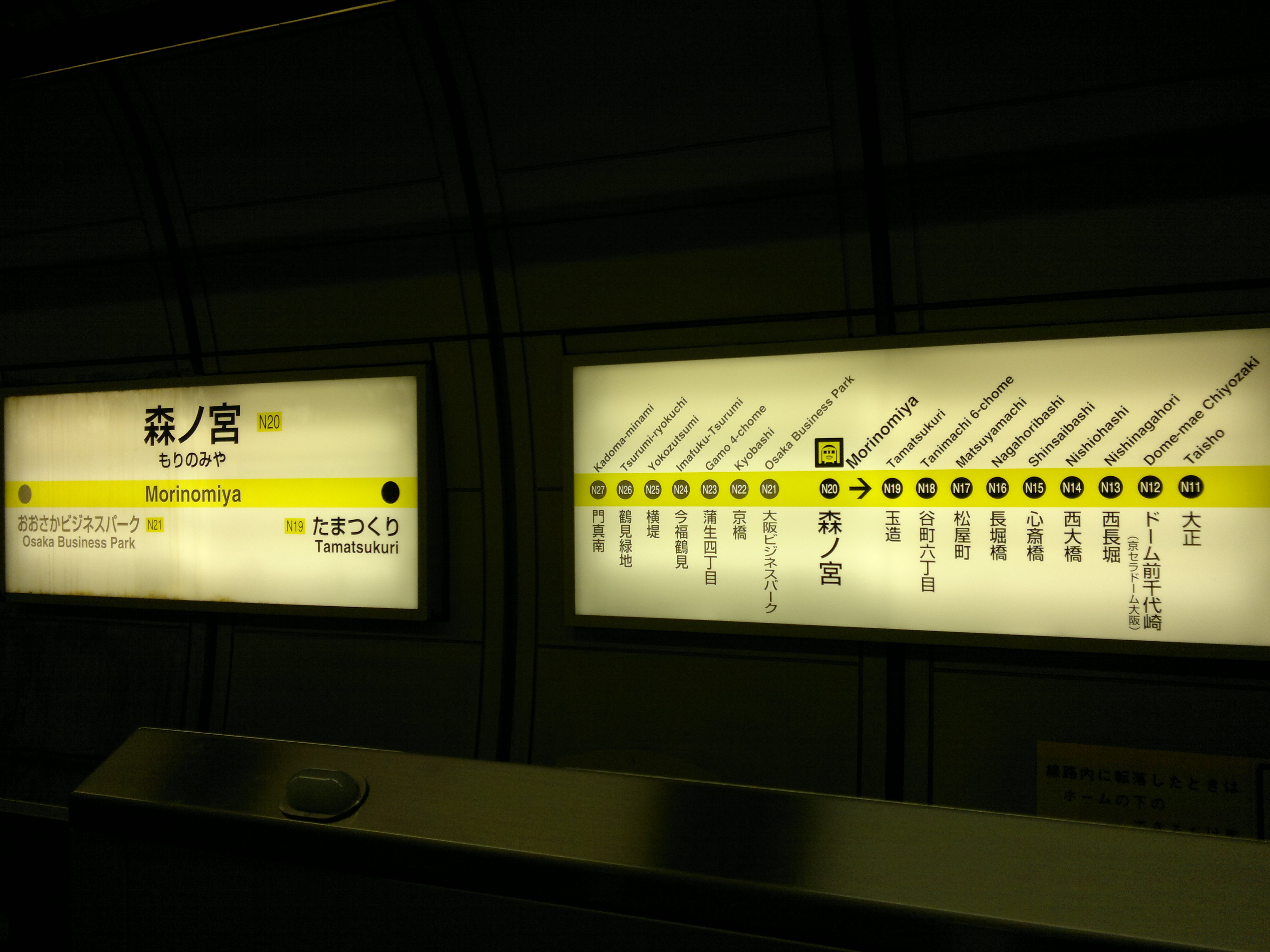 大阪地鐵森之宮站長堀鶴見綠地線的標示